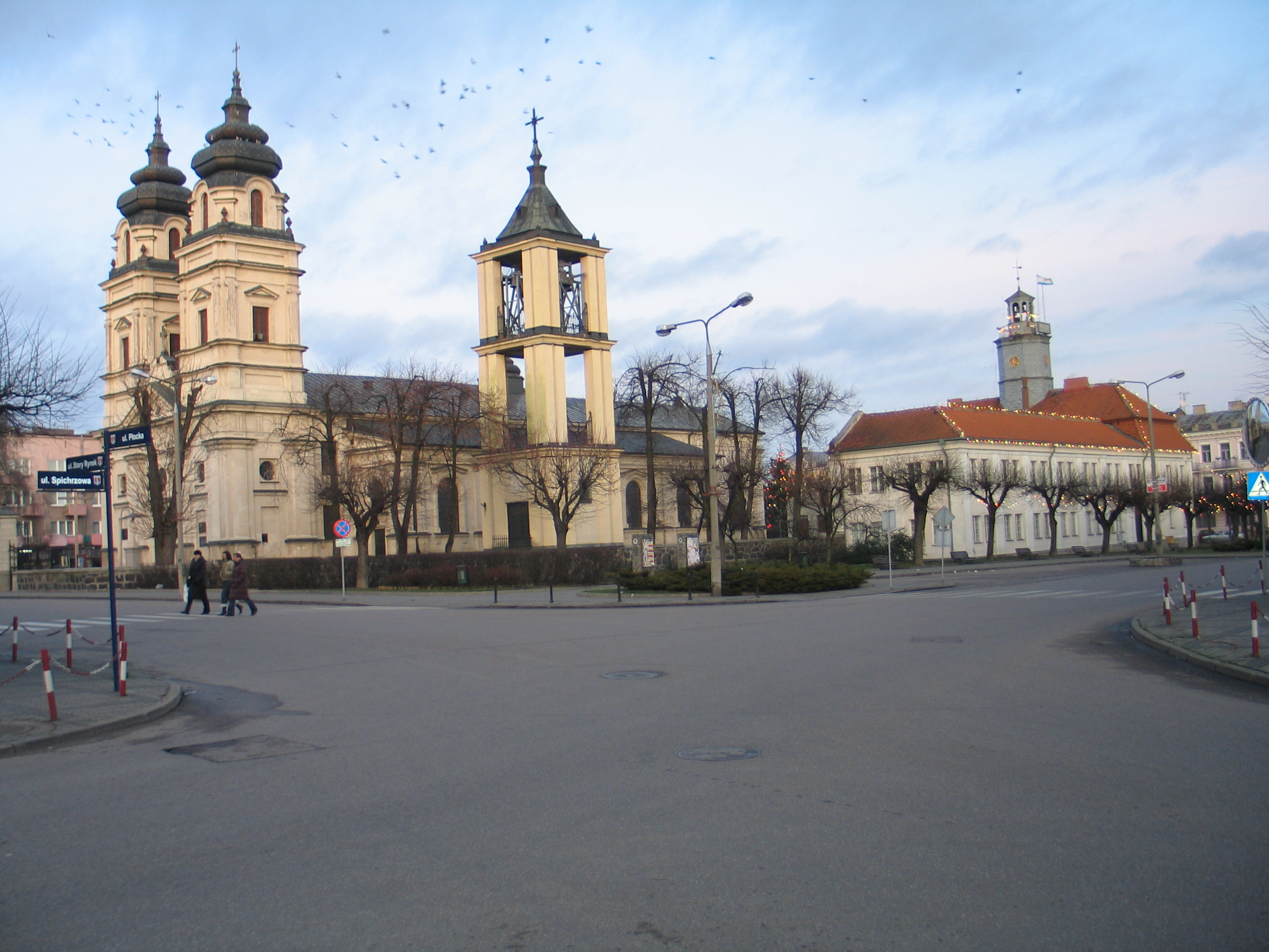 Stary Rynek w Mławie. Widok ogólny na kościół farny Św. Trójcy i ratusz.